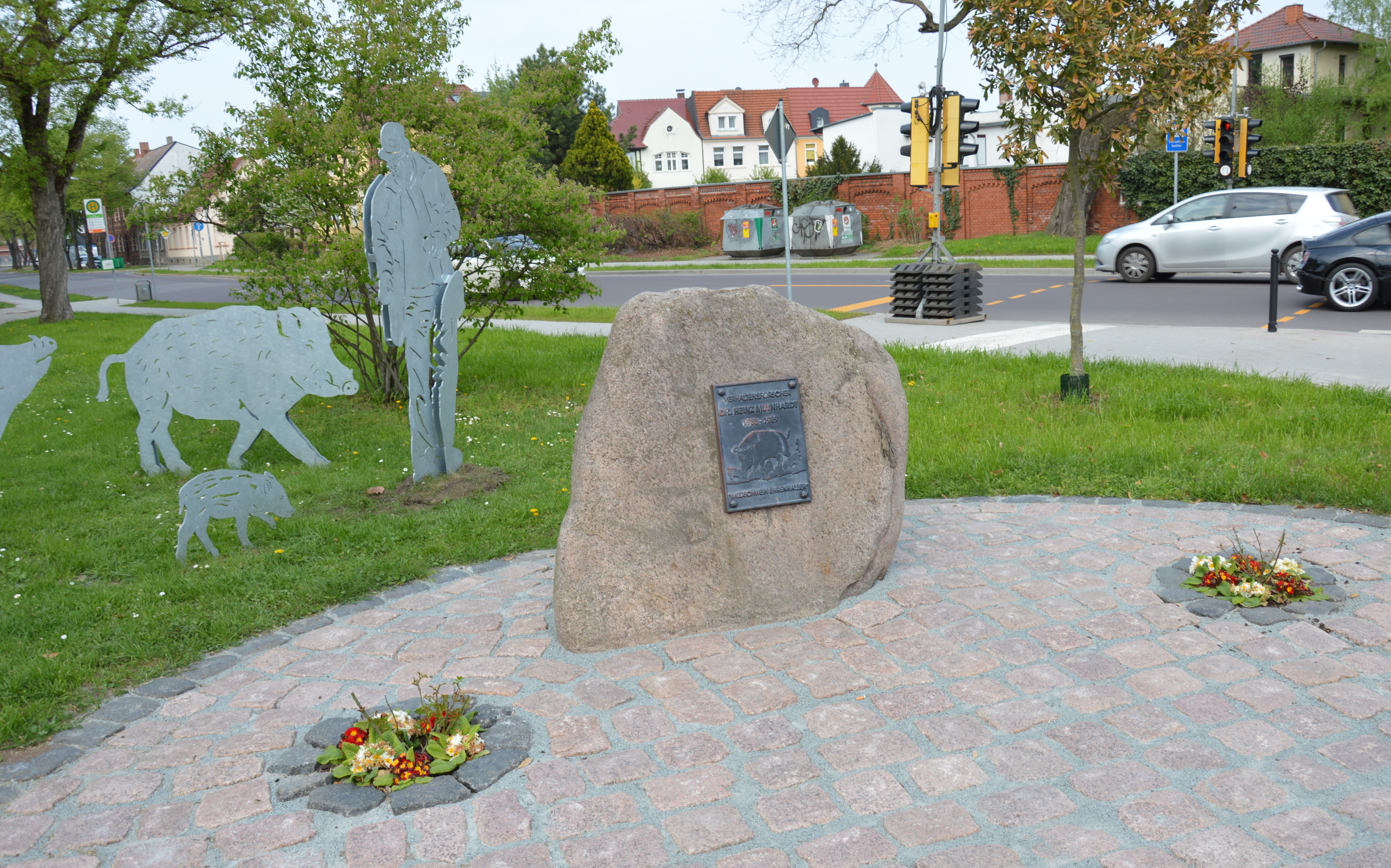 Denkmal für Heinz Meynhardt